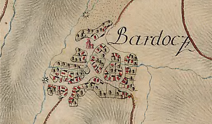 Bardoc alaprajza a XVIII. száadban